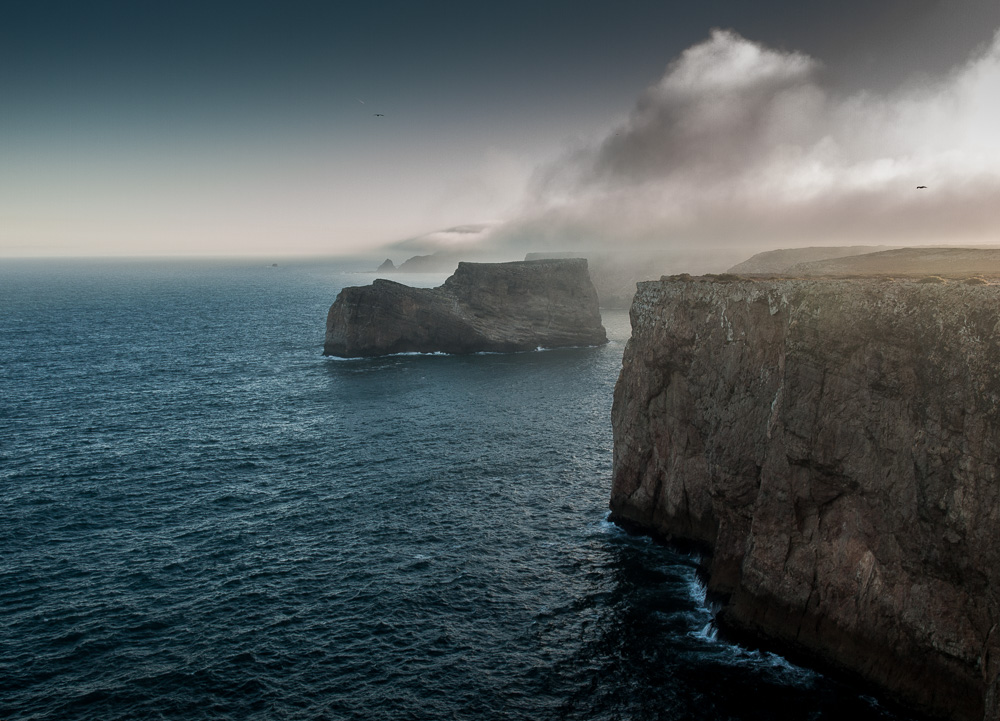 Cape St. Vicente, Portugal